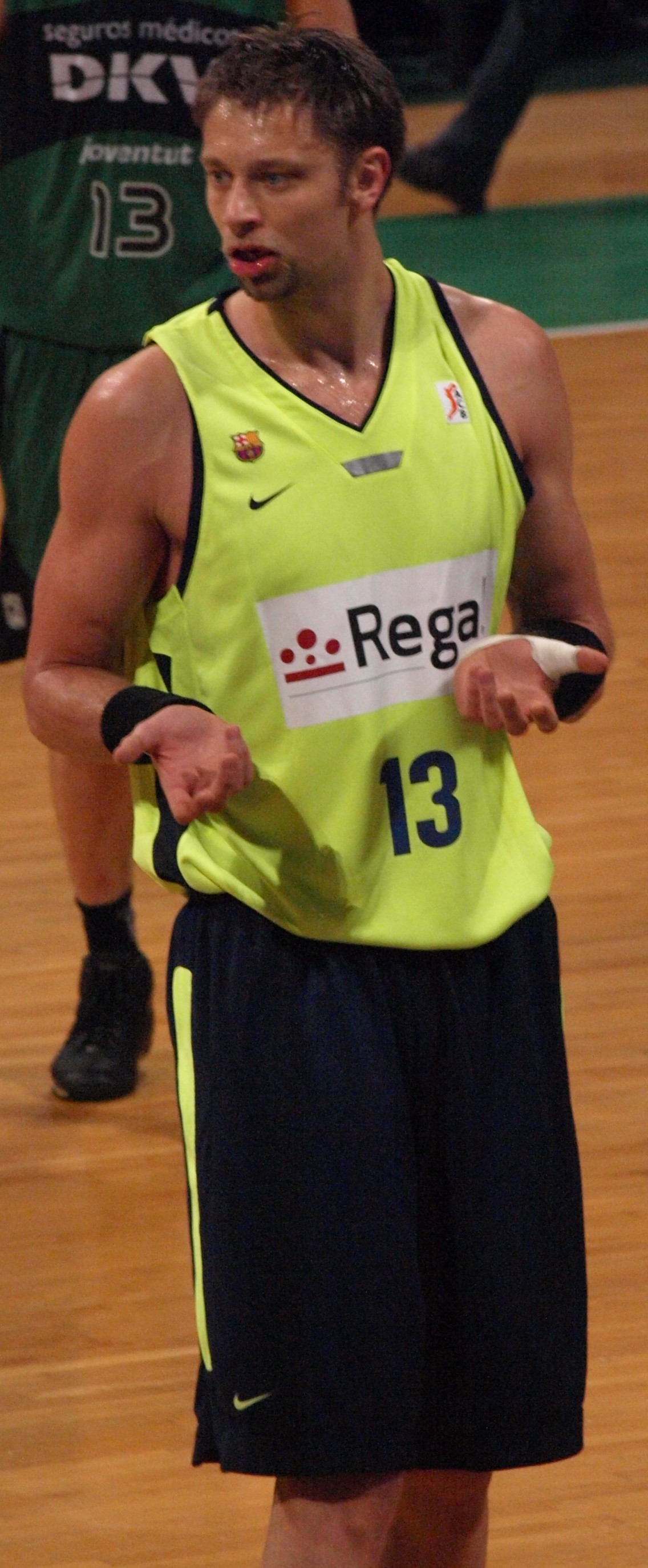 David Andersen, en el partido que enfrentó al FC Barcelona y al DKV Joventut de liga ACB en el Olímpico de Badalona en enero de 2009